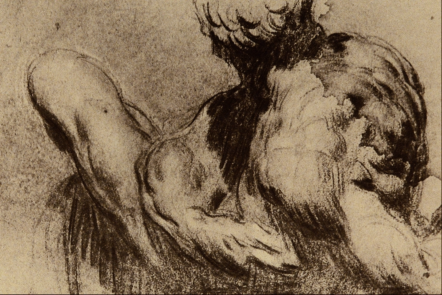 Studio del Crepuscolo di Michelangelo